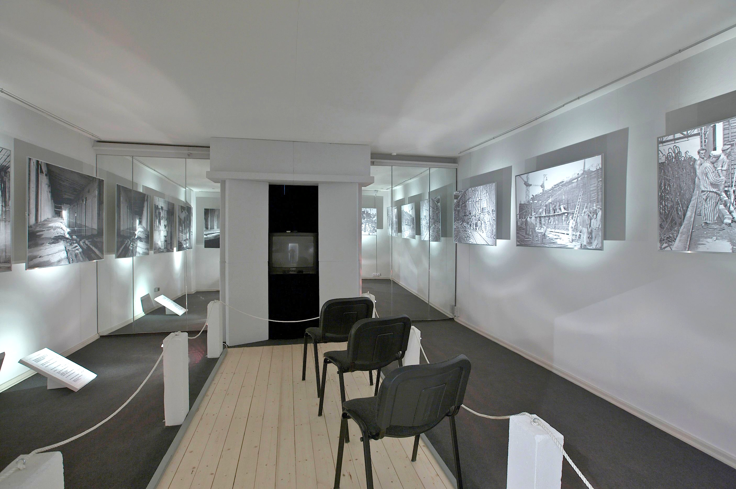 Bunkerraum in der Gedenkstätte Baracke Wilhelmine in Schwanewede-Neuenkirchen in Niedersachsen/Deutschland.